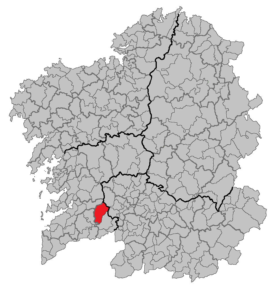 Mapa coa localización do concello de O Covelo.